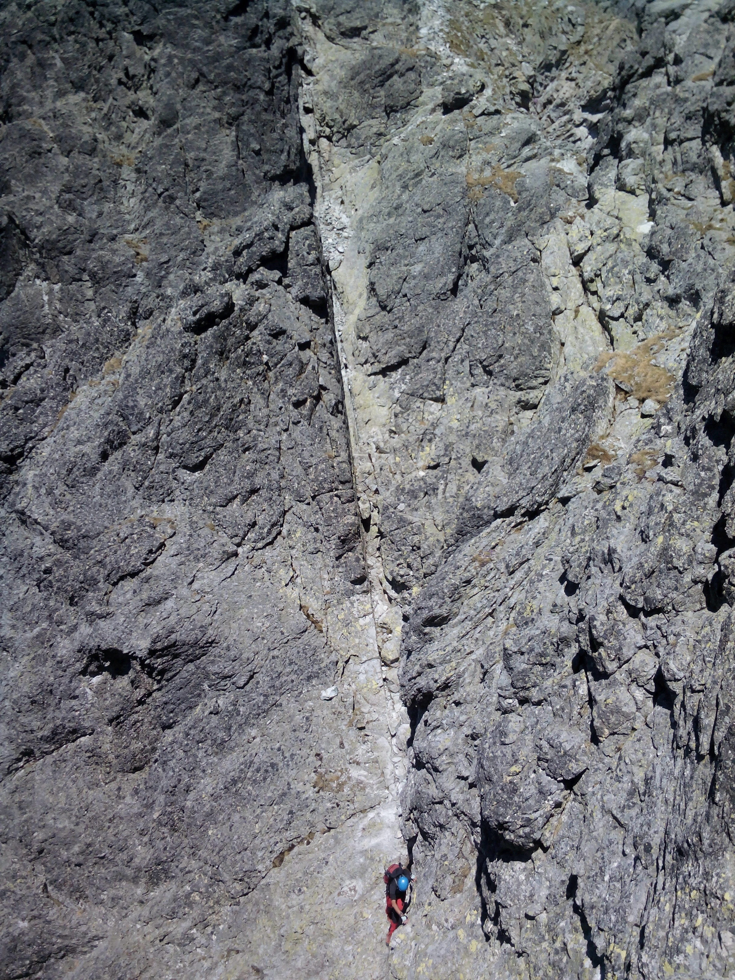 Wejście na Staroleśny Szczyt